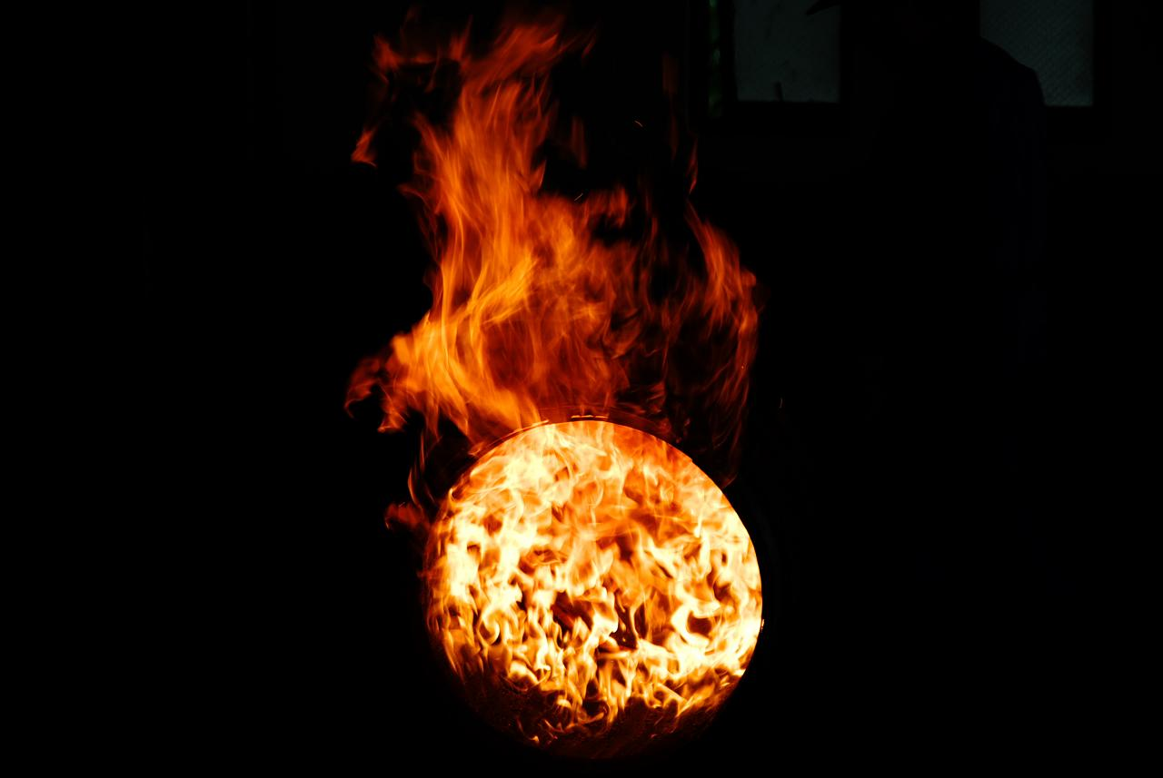 Barrel burning, Hakushu distillery, Japan